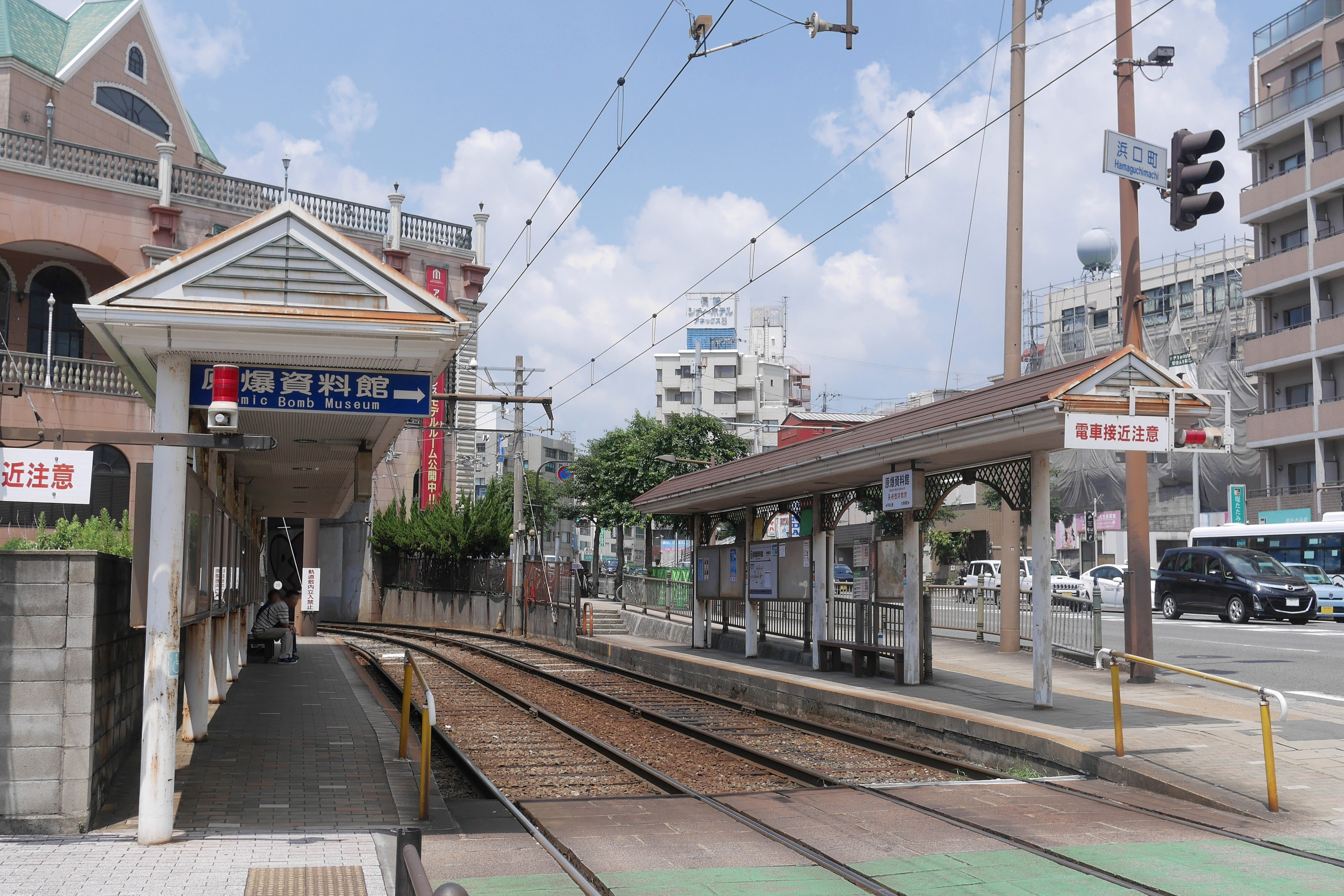 長崎電気軌道の原爆資料館停留場（長崎県長崎市）。2018年8月に浜口町より改称された。